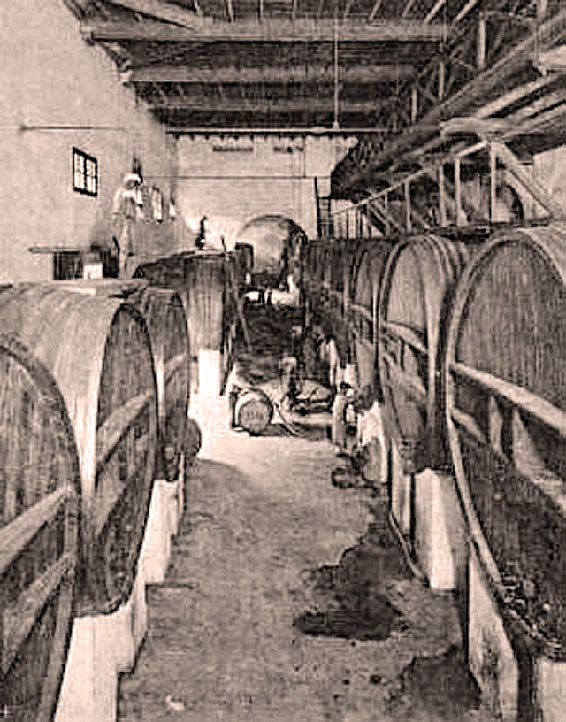 Cave de Notre-Dame de Staoueli, abbaye trappiste en Algérie 1902